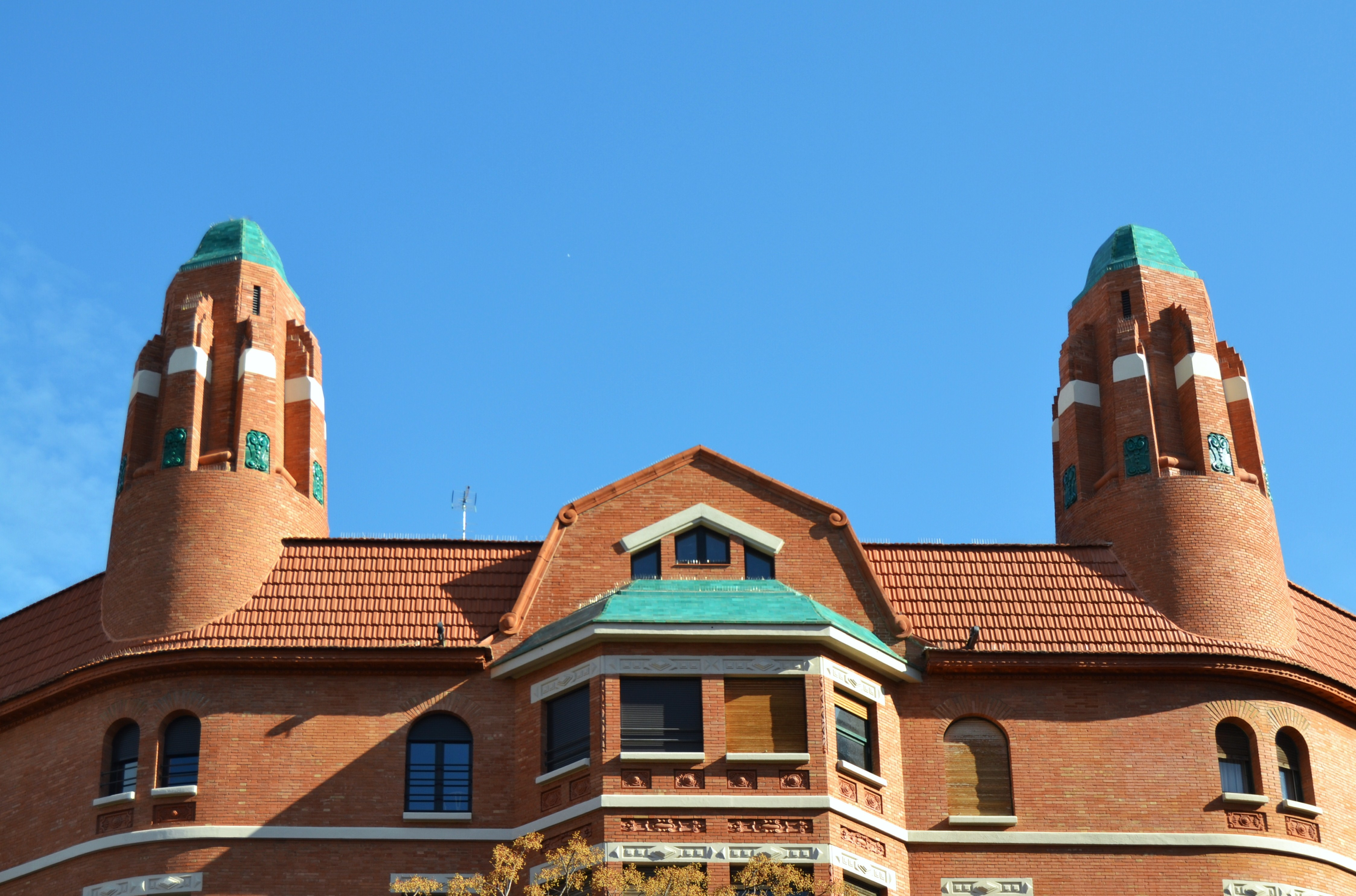 Torretes de la finca Roja, València.